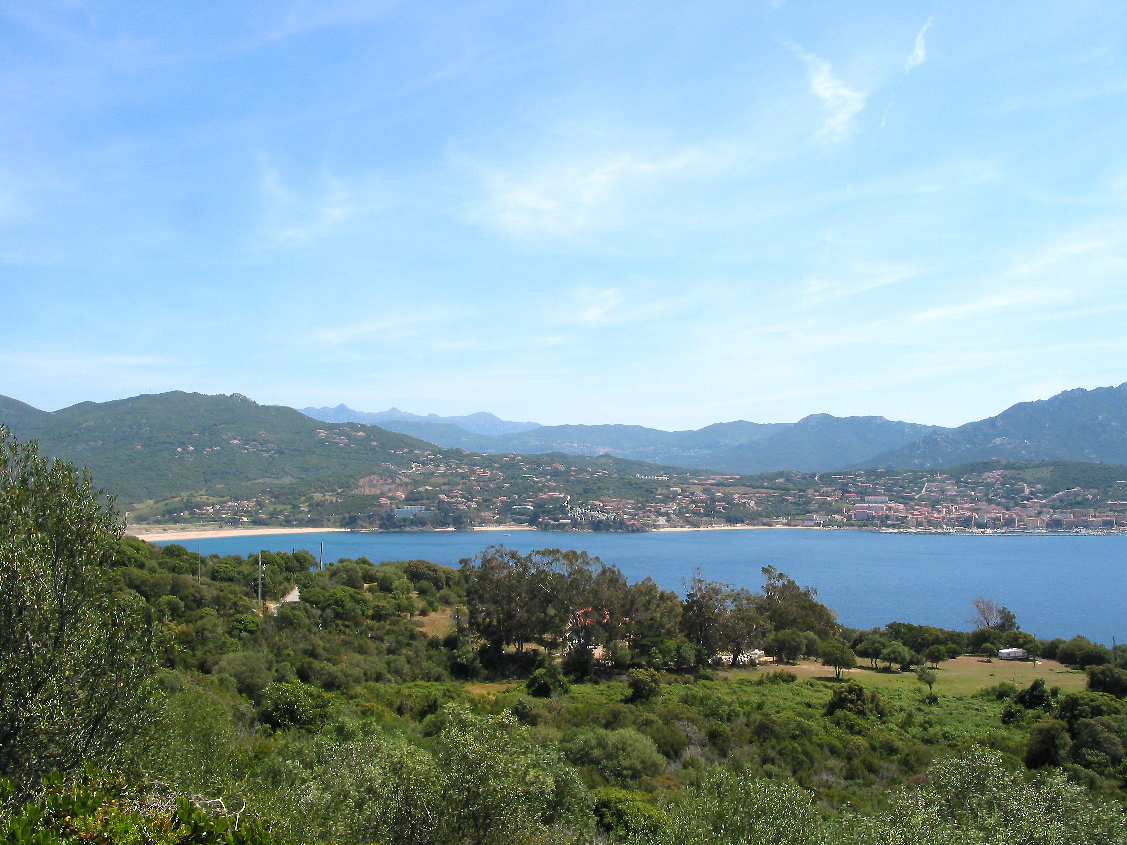 Propriano, Corse-du-Sud - France, le Golfe du Valinco et la ville. Corsu: Prupià Francia (Corsica suttana), u golfu di Valincu è u cita. Walon: Sartène – France (Corse do Sud) – li Golfe di Valinco èt l’vile.